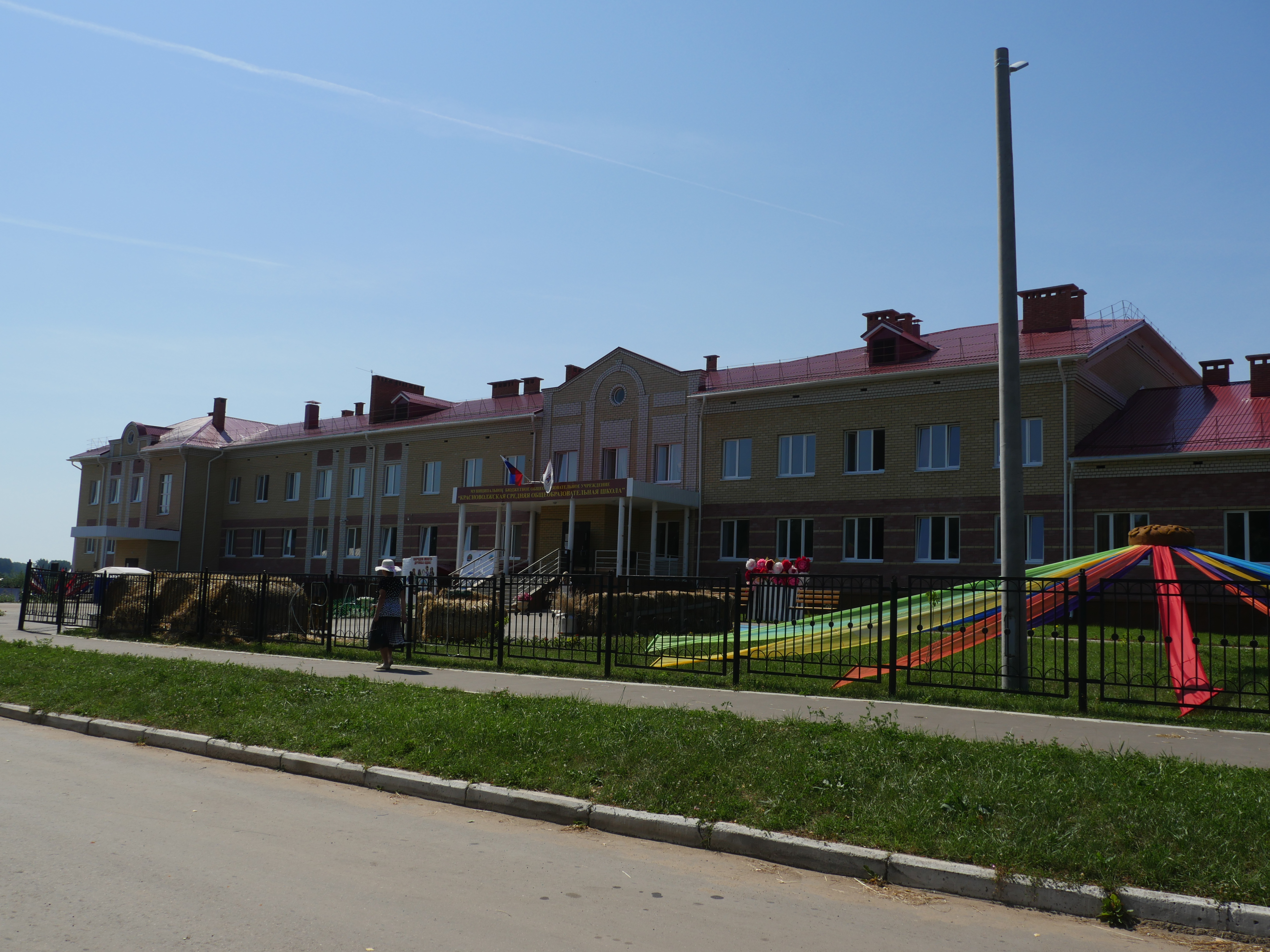 Олык марий: Кулаково селасе школ